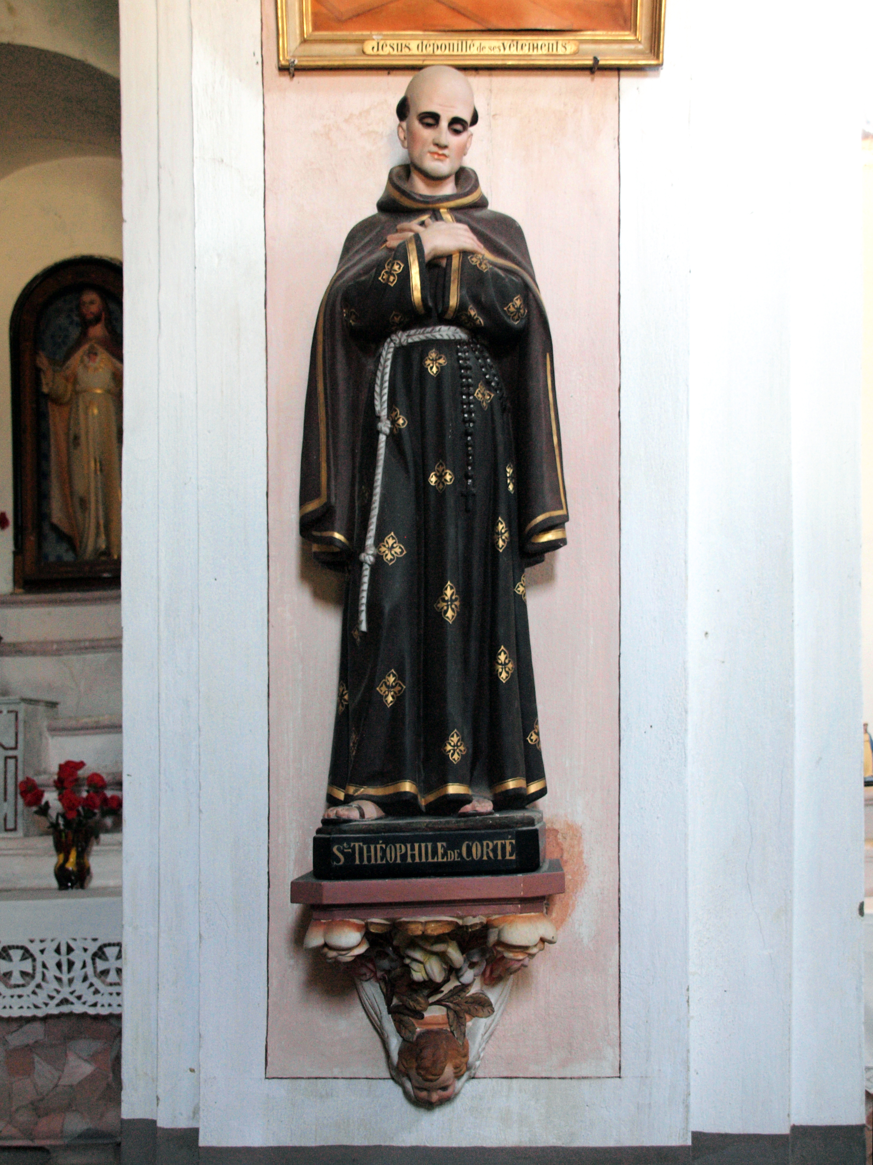 Alando (Corse) - Statue de saint Théophile de Corte dans l'église conventuelle paroissiale